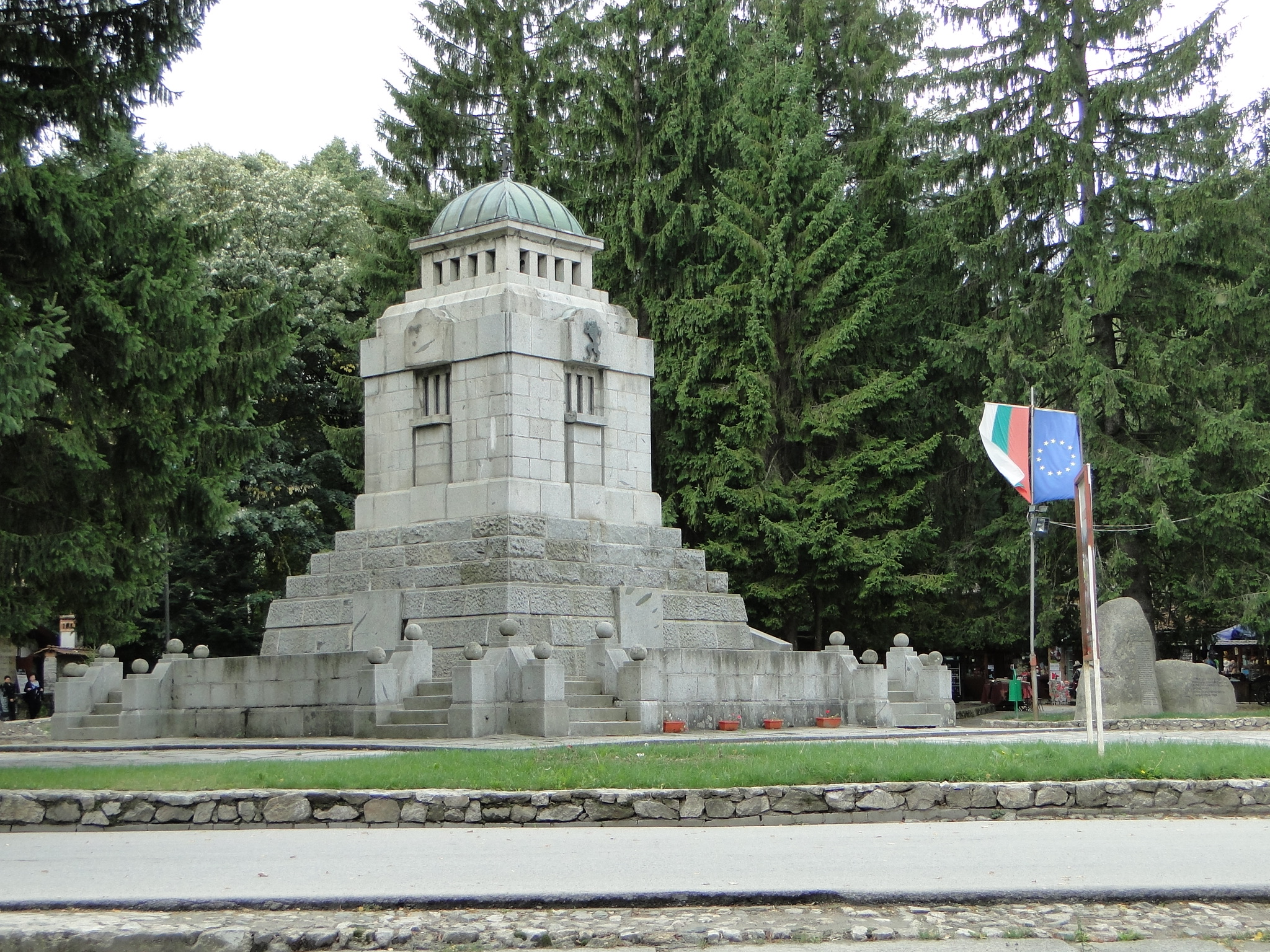 Копривщица